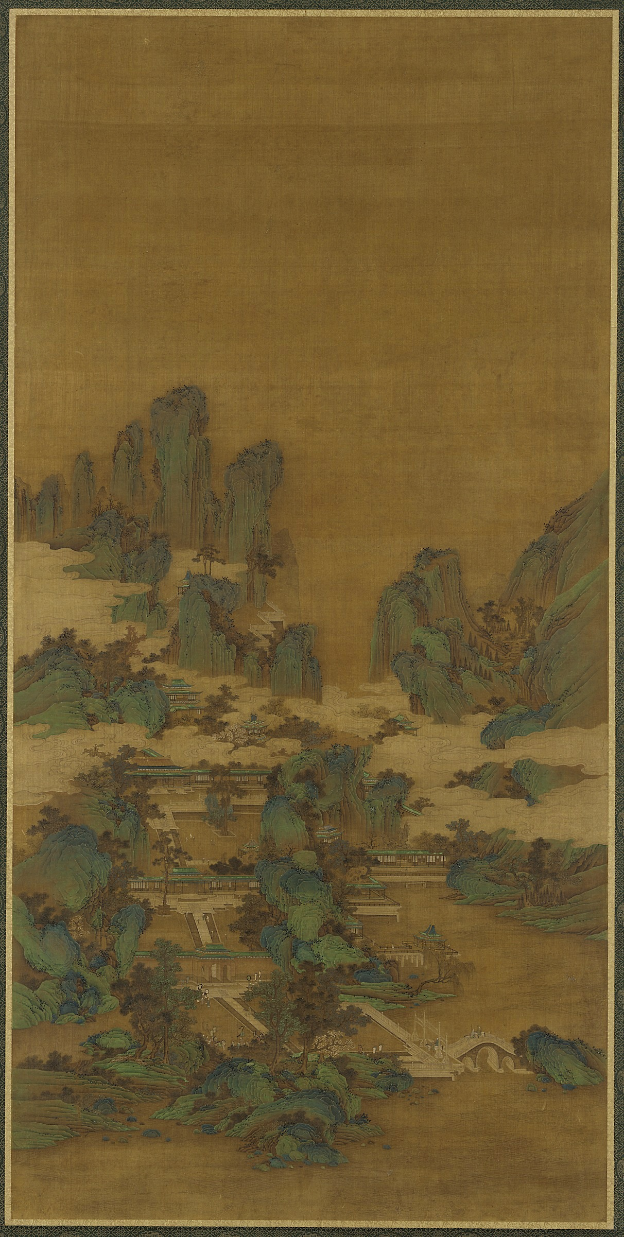 Ли Сысюнь. Пейзаж. Копия эпохи Мин. нач. 16 в. Фрир